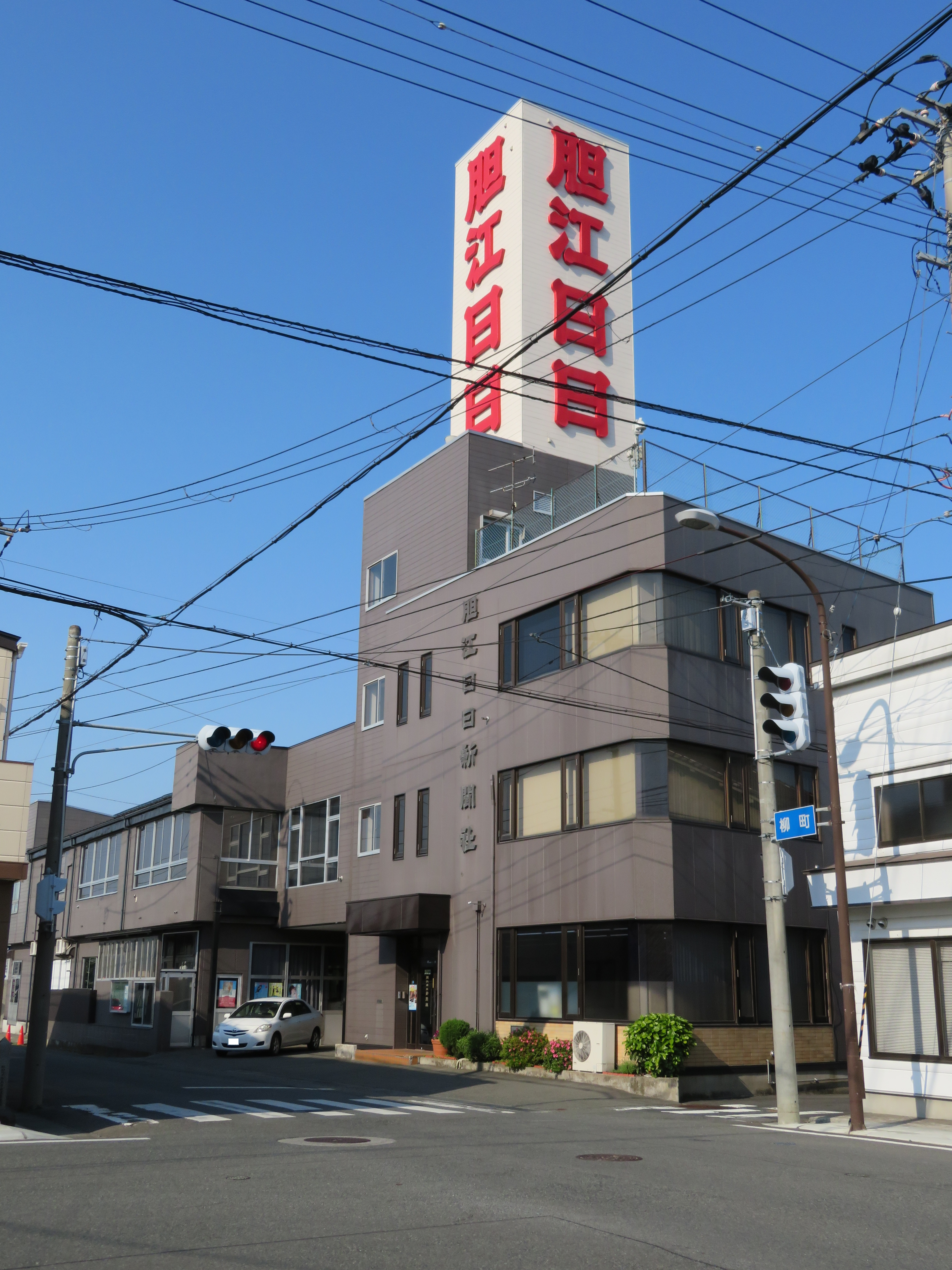 胆江日日新聞社本社 Canon PowerShot SX720 HS